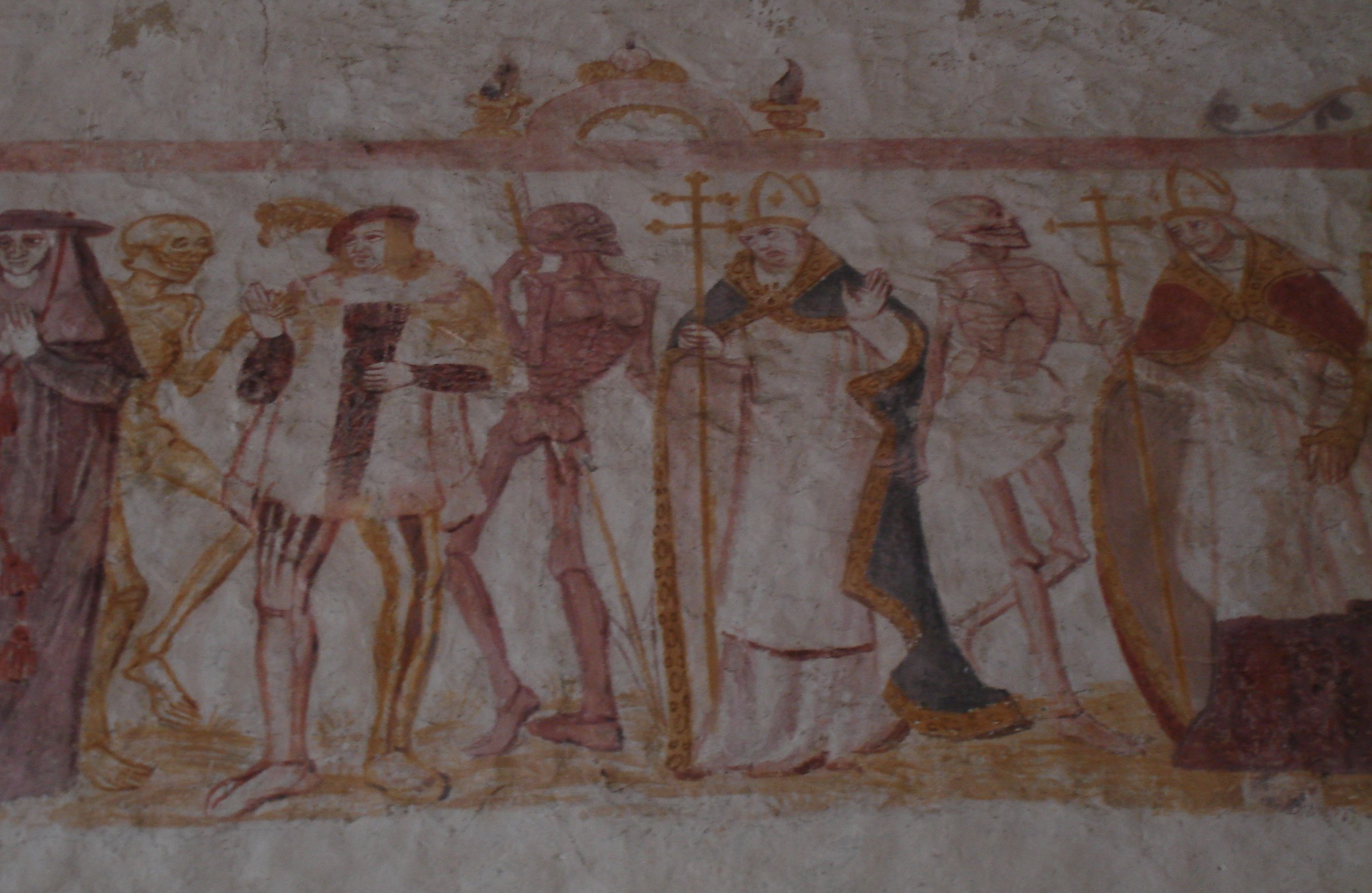 Fresque la Danse Macabre, Église Saint-Germain de La Ferté-Loupière.